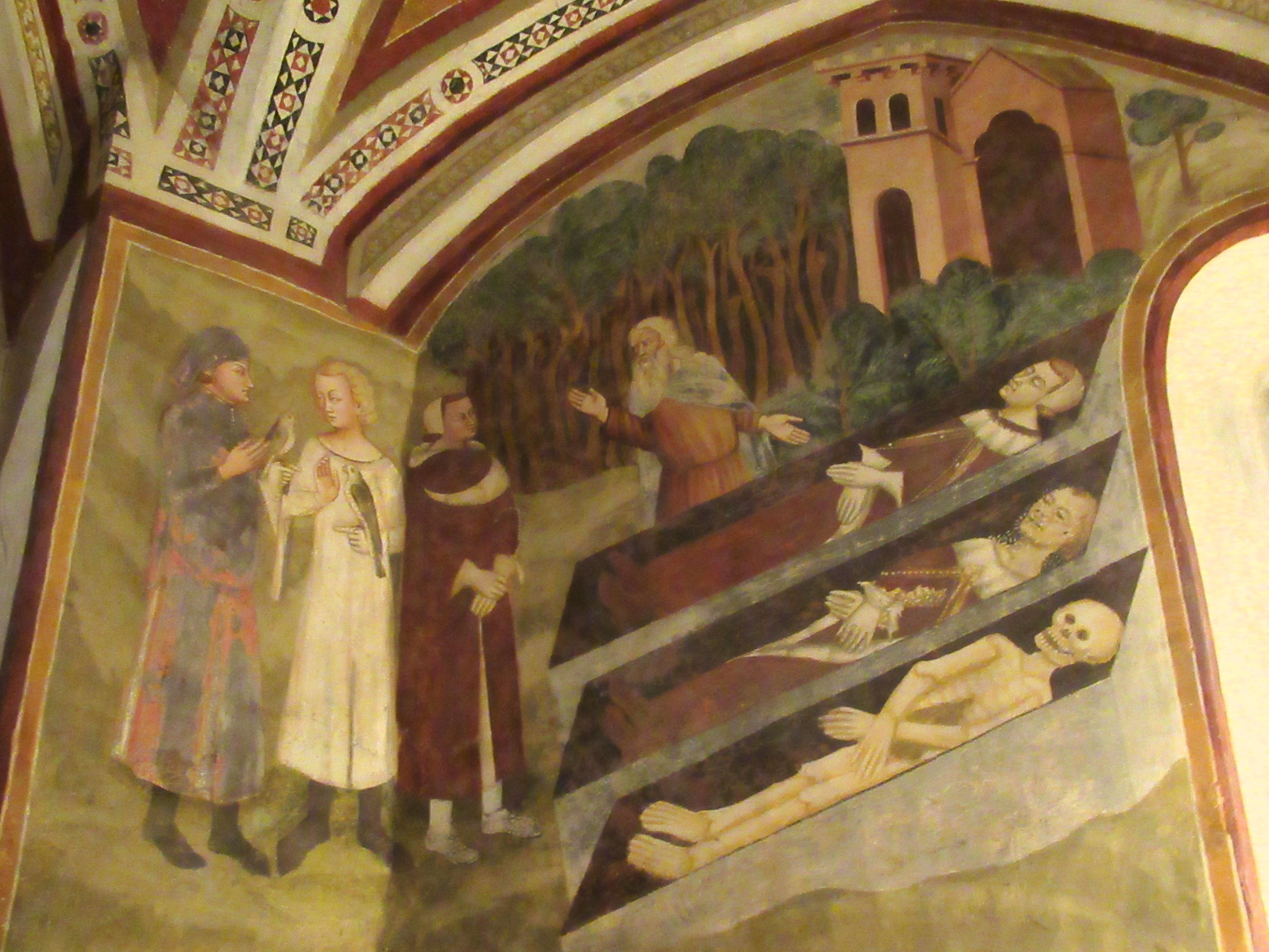 Fresque, école Siennoise, XIVe siècle Subiaco (Latium, Italie), monastère Saint Benoît, Sacro Speco